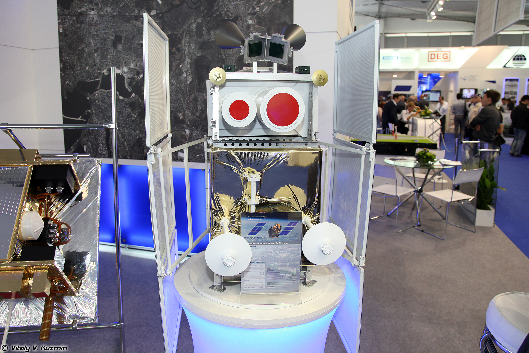 Космический аппарат Канопус-В (Kanopus-V spacecraft)